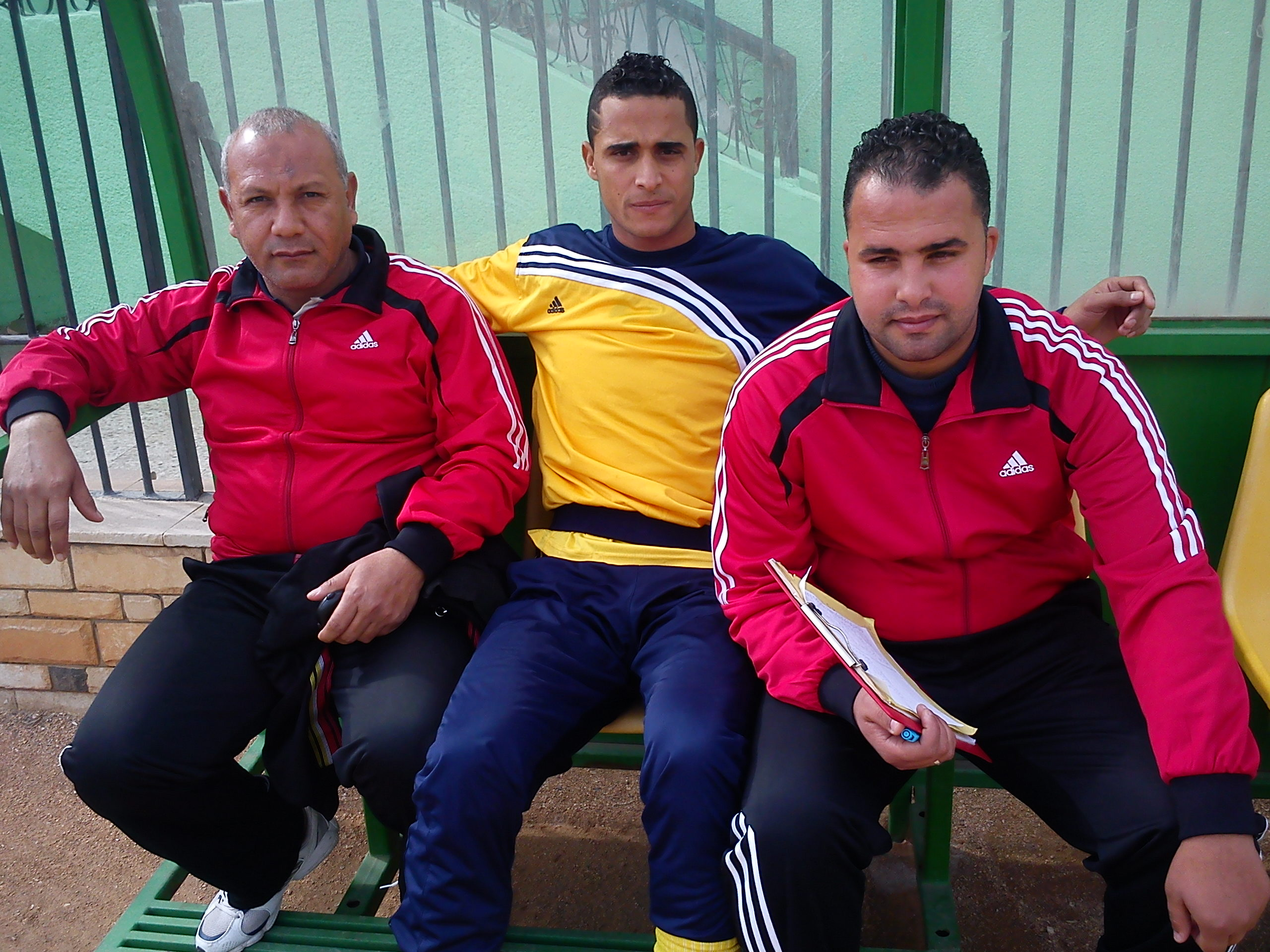 كابتن بلبل بيومى المدير الفنى لنادى بلقاس الرياضى على اليسار والى جواره اللاعب احمد الغريب وعلى اليمين الكابتن لبه